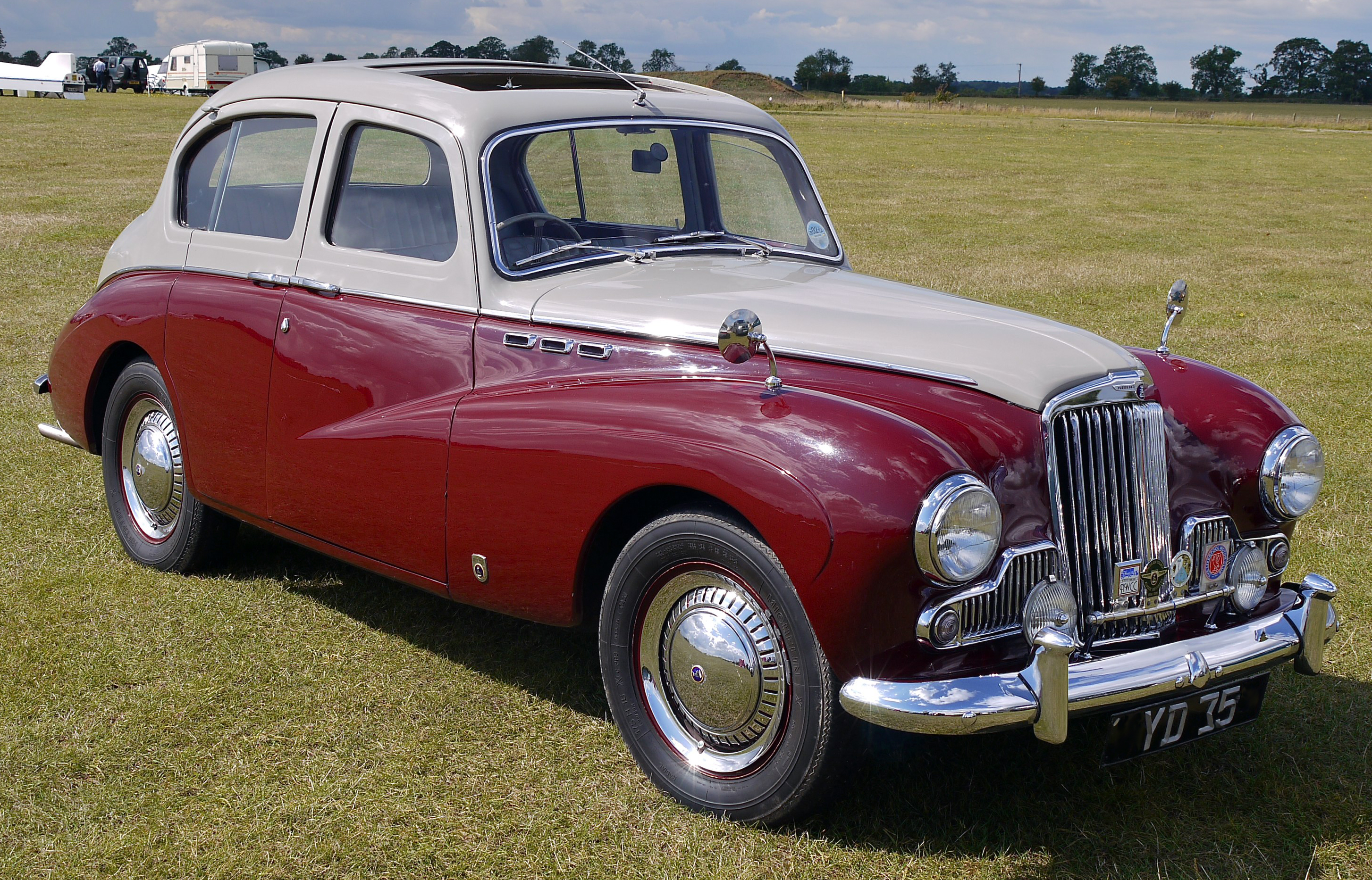 1956 Sunbeam Mk III